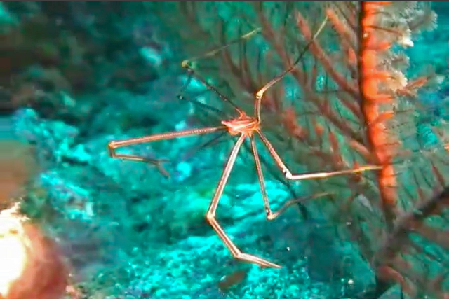 Chirostylus ortmanni / オルトマンワラエビ